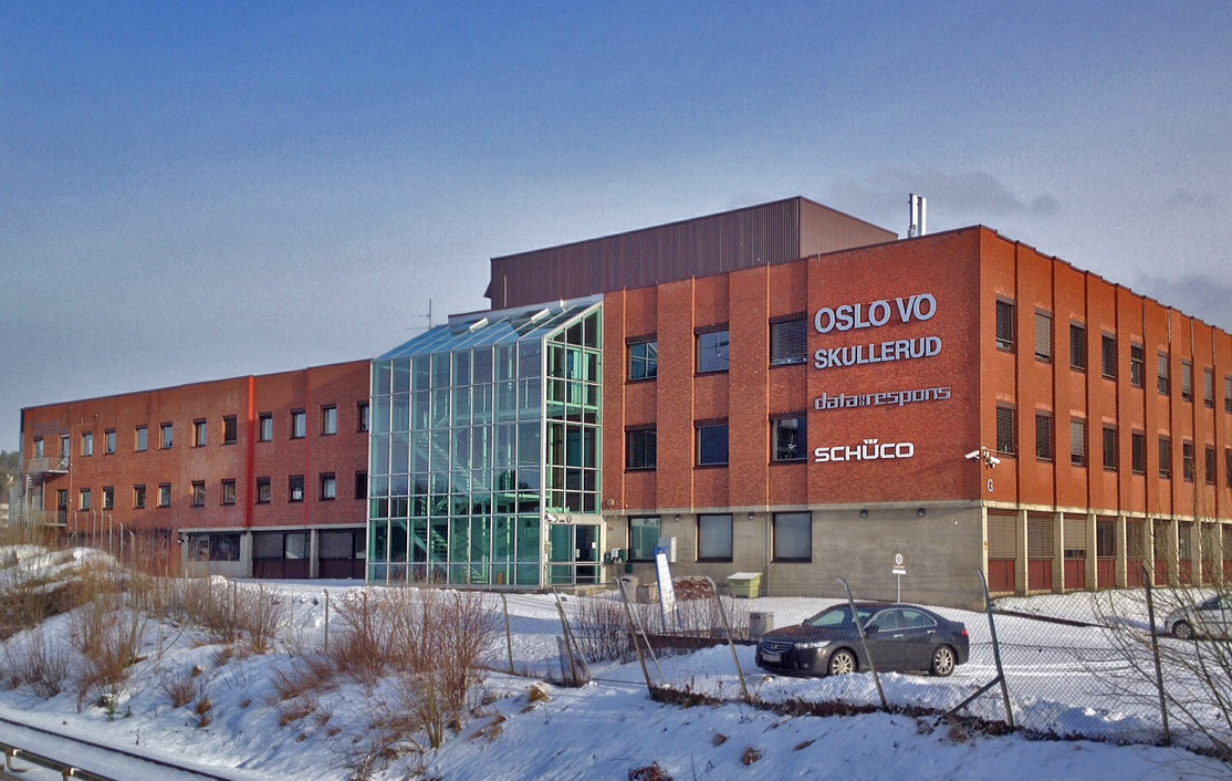 Oslo Voksenopplæring Skullerud 2015